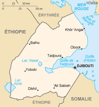 Carte de Djibouti ville